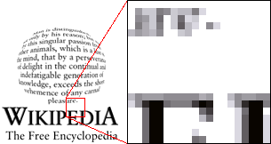 Pixel eksempel (fra engelsk Wikipedia)